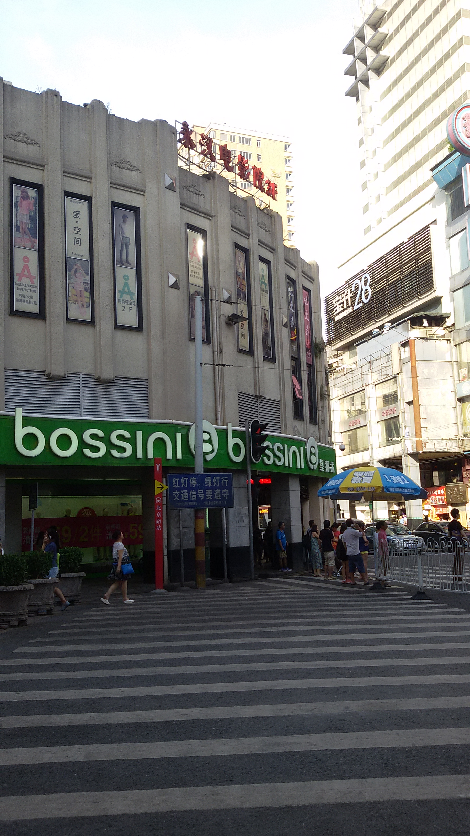 粵語: 永漢電影院